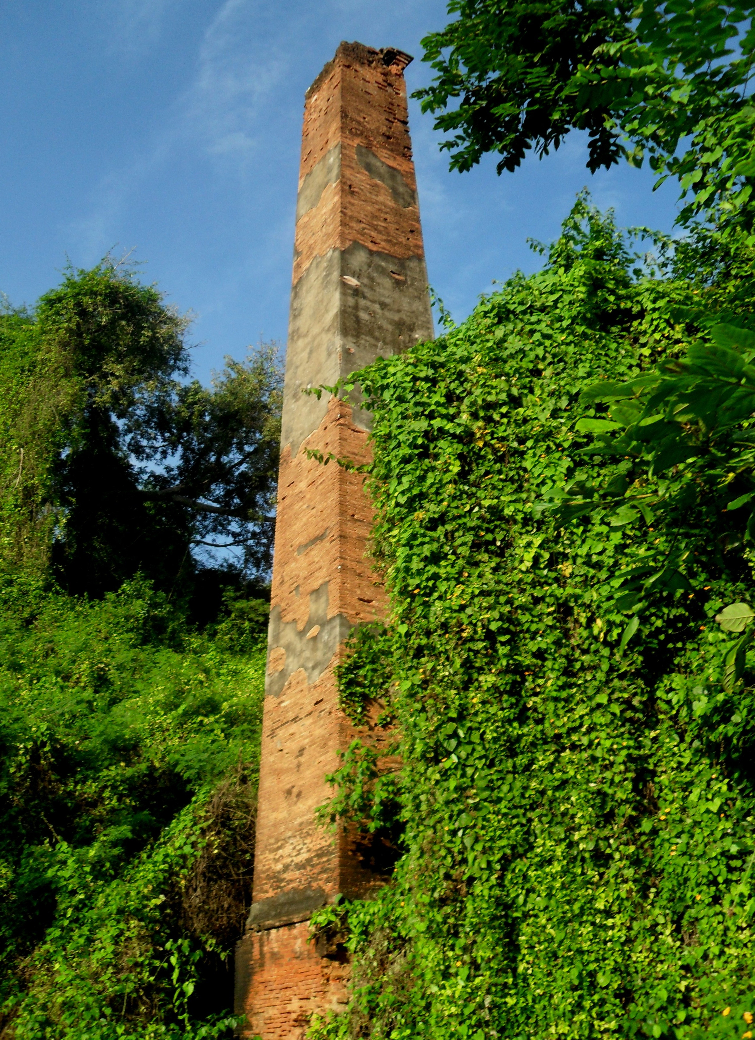 Antigua chimenea en barrio Santa Rosa de Hatillo, Puerto Rico